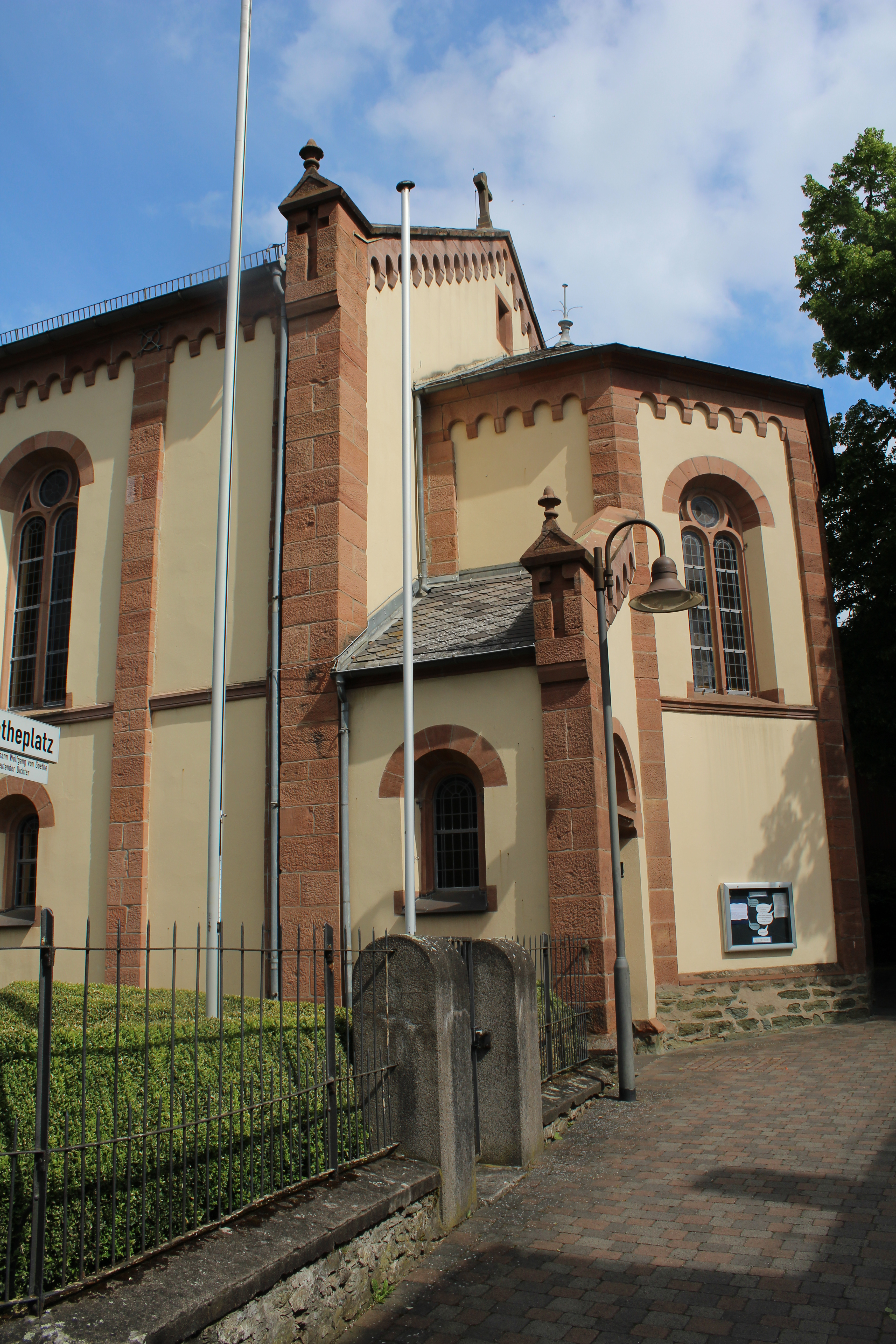 Ev. Kirche Garbenheim, Wetzlar, Lahn-Dill-Kreis, Hessen, Deutschland